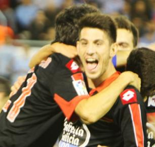 Pizzi celebrando o gol do Deportivo no partido Celta-Dépor do 27 de outubro do 2012.